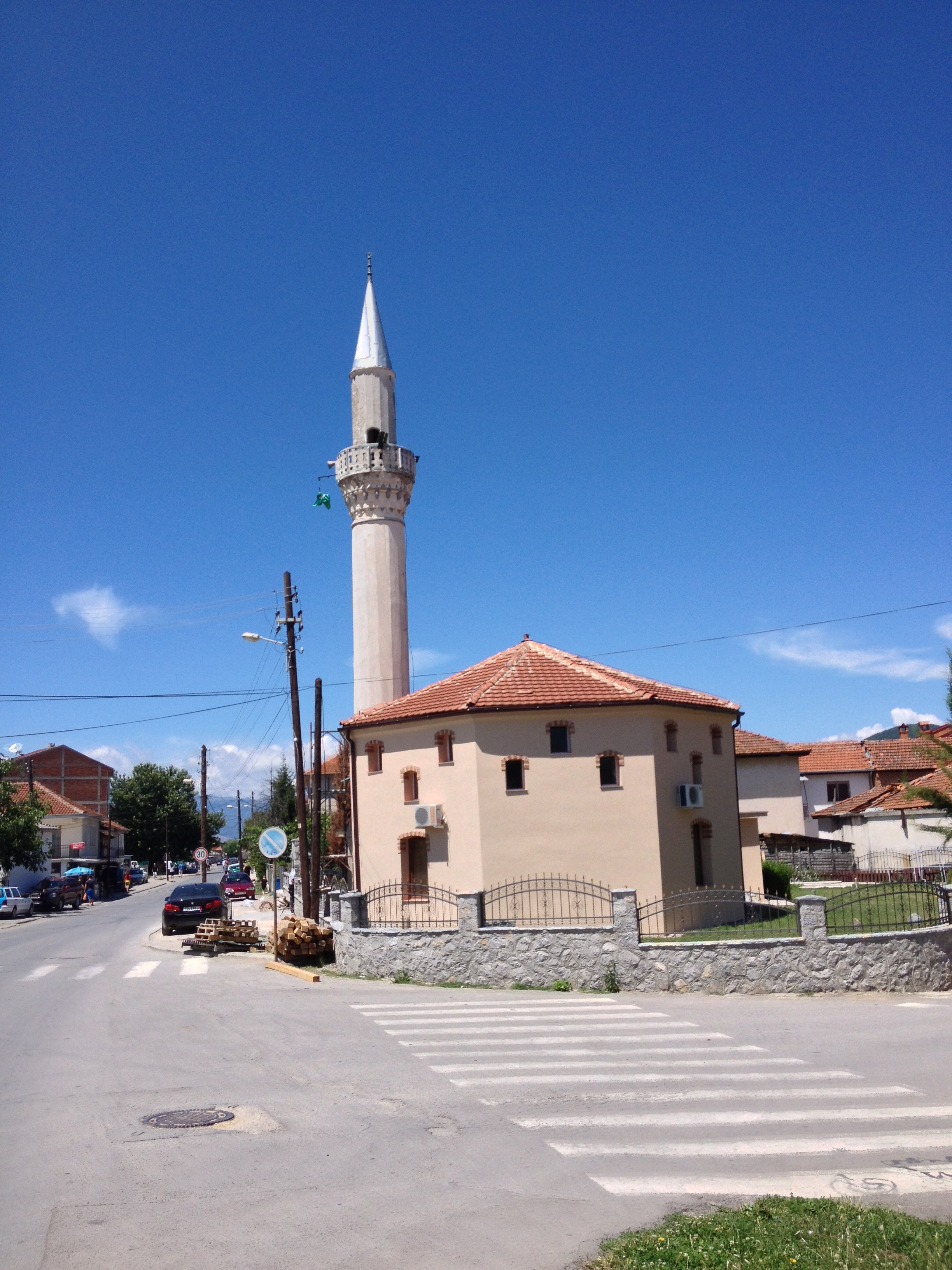 Die Kuloglu-Moschee in Ohrid, Mazedonien